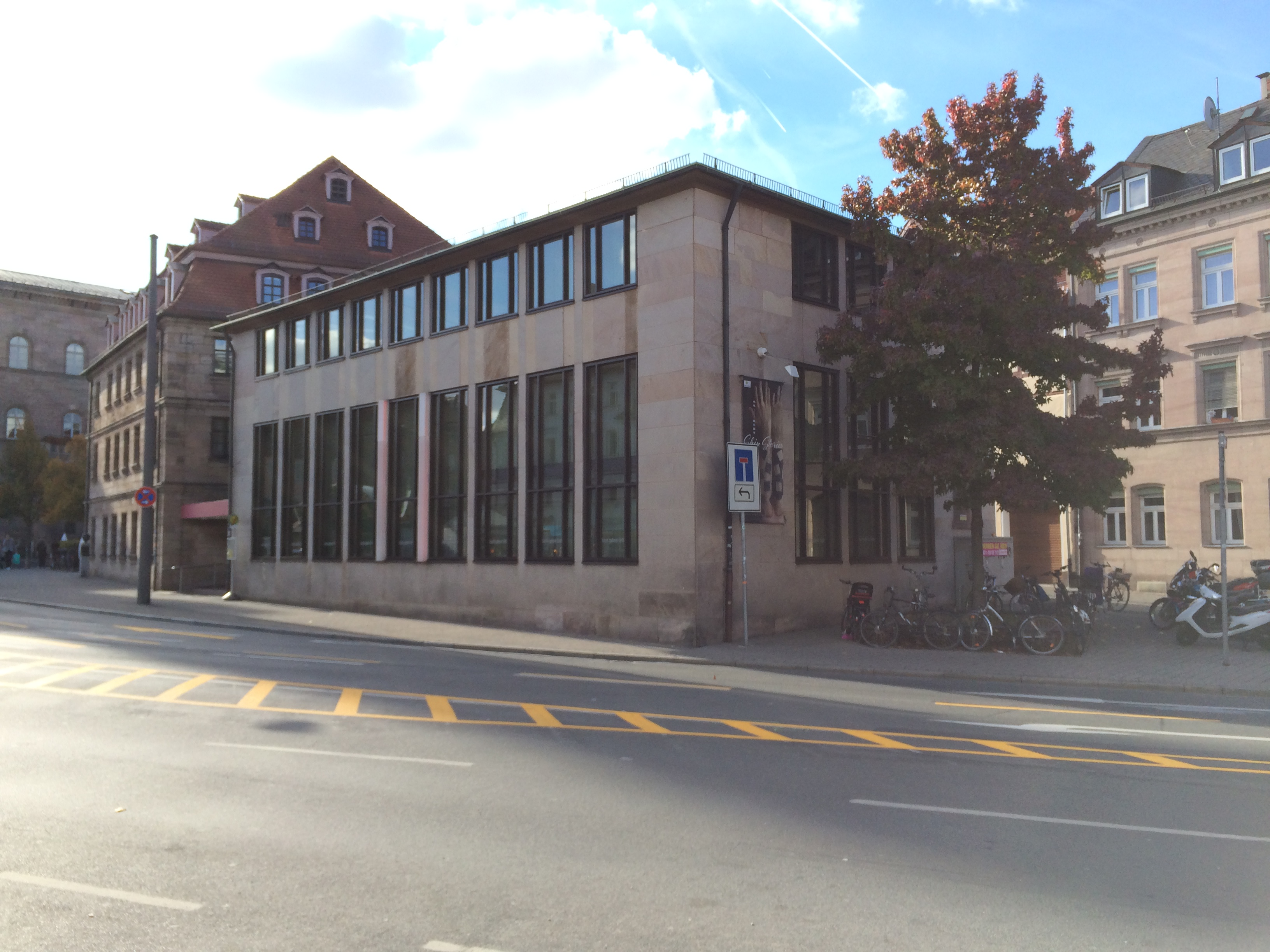 Das Gebäude der kunst galerie fürth am Königsplatz, 2015